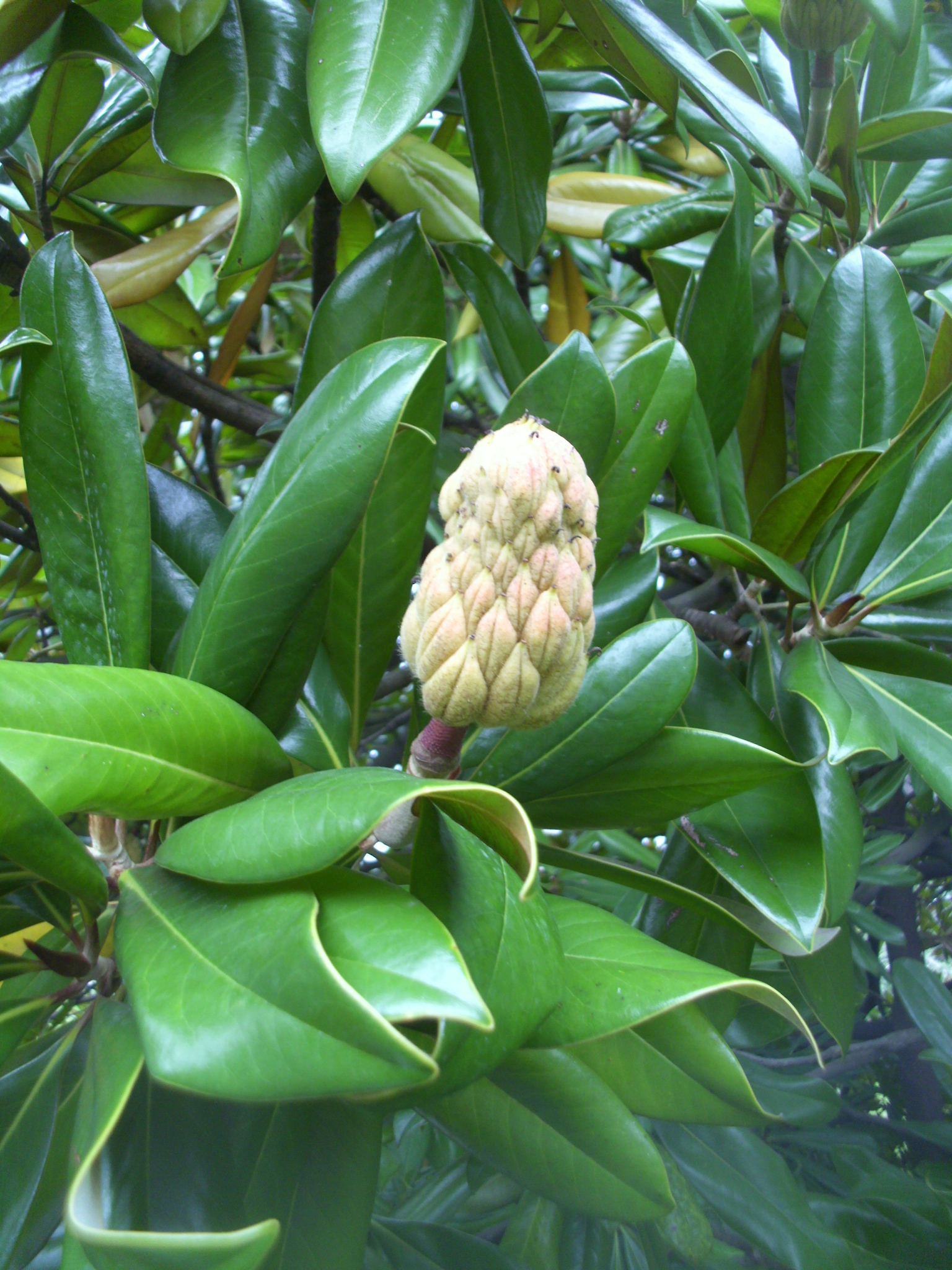 Immergrüne Magnolie in Istanbul, Dolmarbahce; Blütenstand im Detail